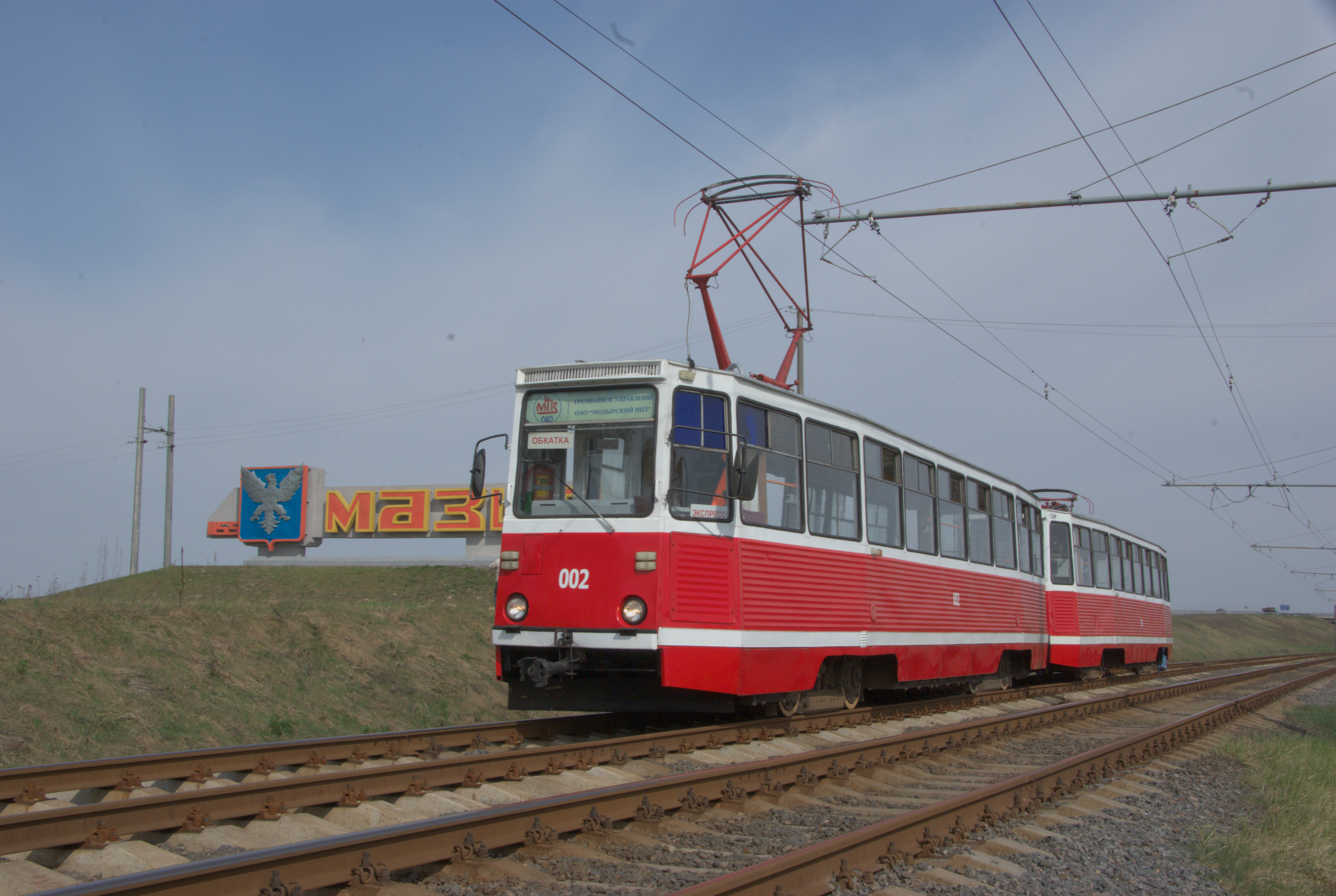 Mozyr tram fantrip. Мозырь - Mazyr, Belarus